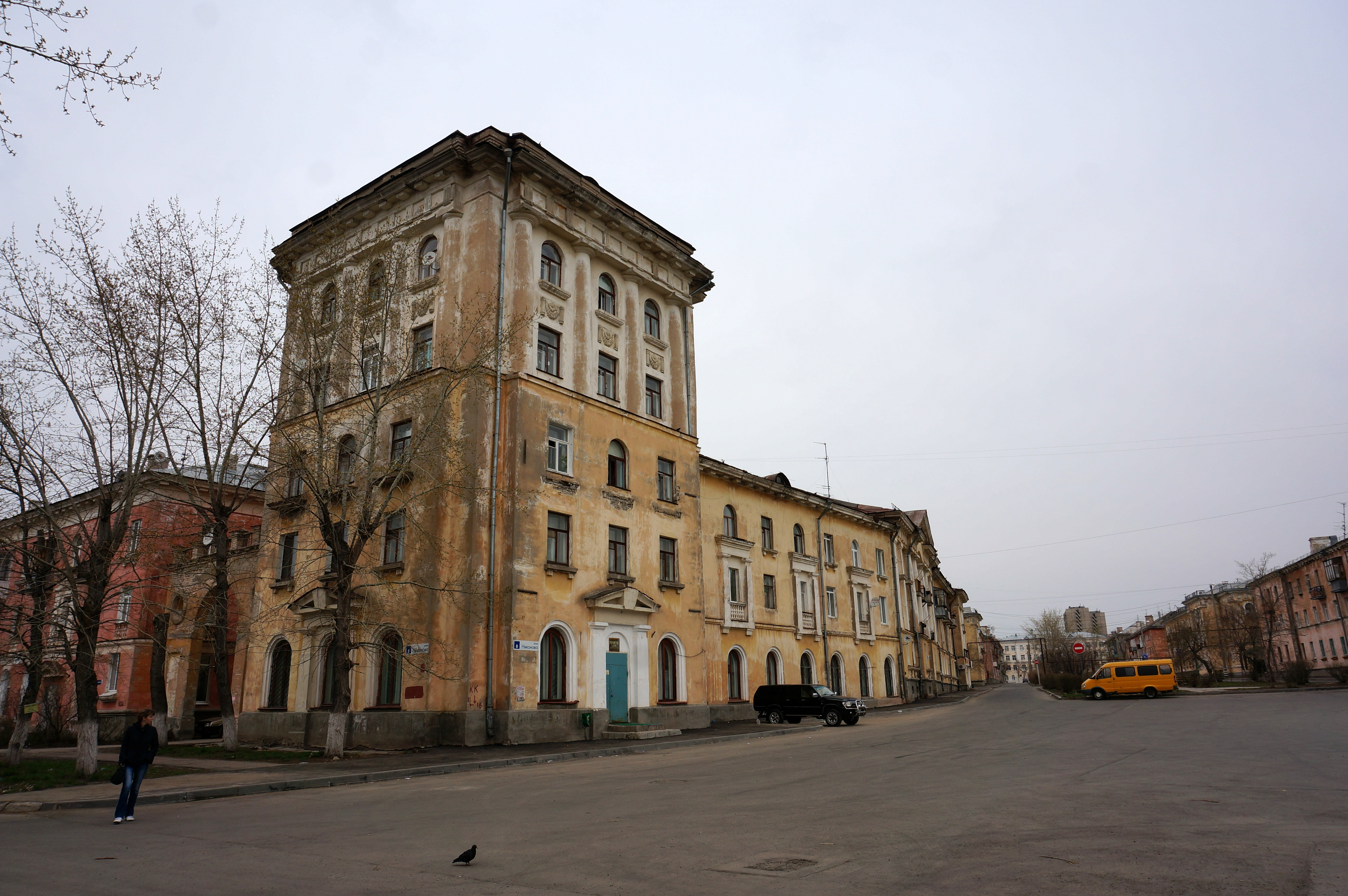 Дом по адресу Никонова 8 (Крылова 1, Носова 7, Тольятти, Россия). Угловая часть трёхэтажного дома поднята до 5 этажей. По первоначальному замыслу здание должно было завершаться 9-метровой башней и шпилем высотой 16,5 метров, покрытым латунью с позолотой